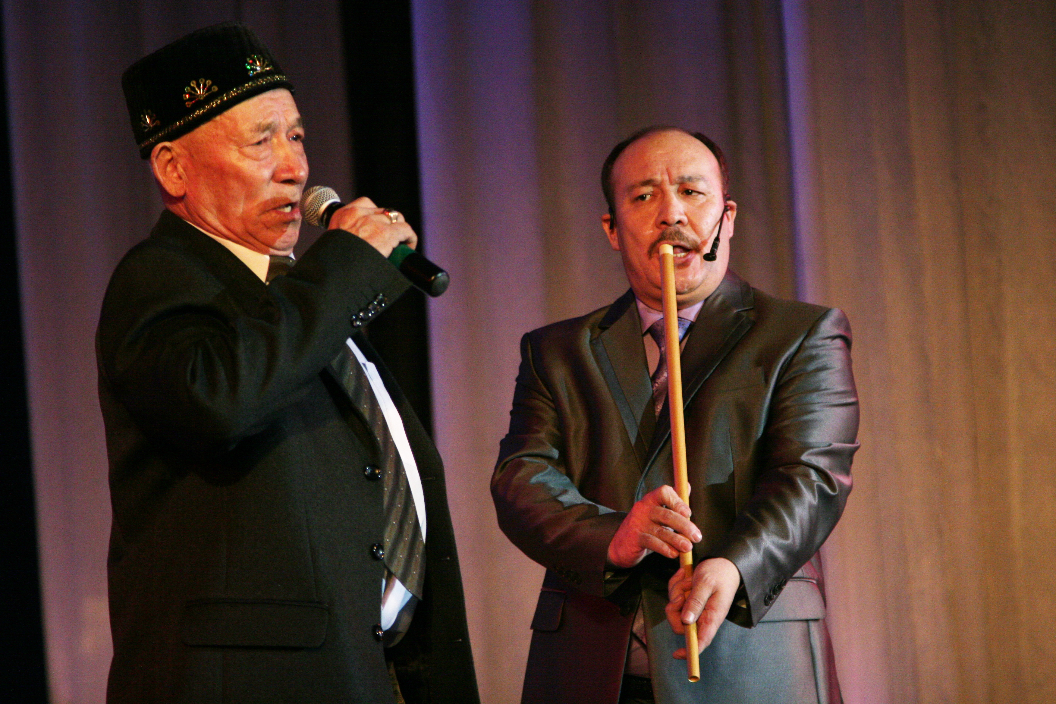 Башҡортса: Айбулат Дәүләтбай улы Рәхмәтуллин, Дәүләтбай Абдрахман улы Рәхмәтулин — ҡурайсы, Башҡортостан Республикаһының халыҡ артисы, Нефтекама дәүләт филармонияһының художество етәксеһе. Ансар Нуретдиновтың шехси архивынан.